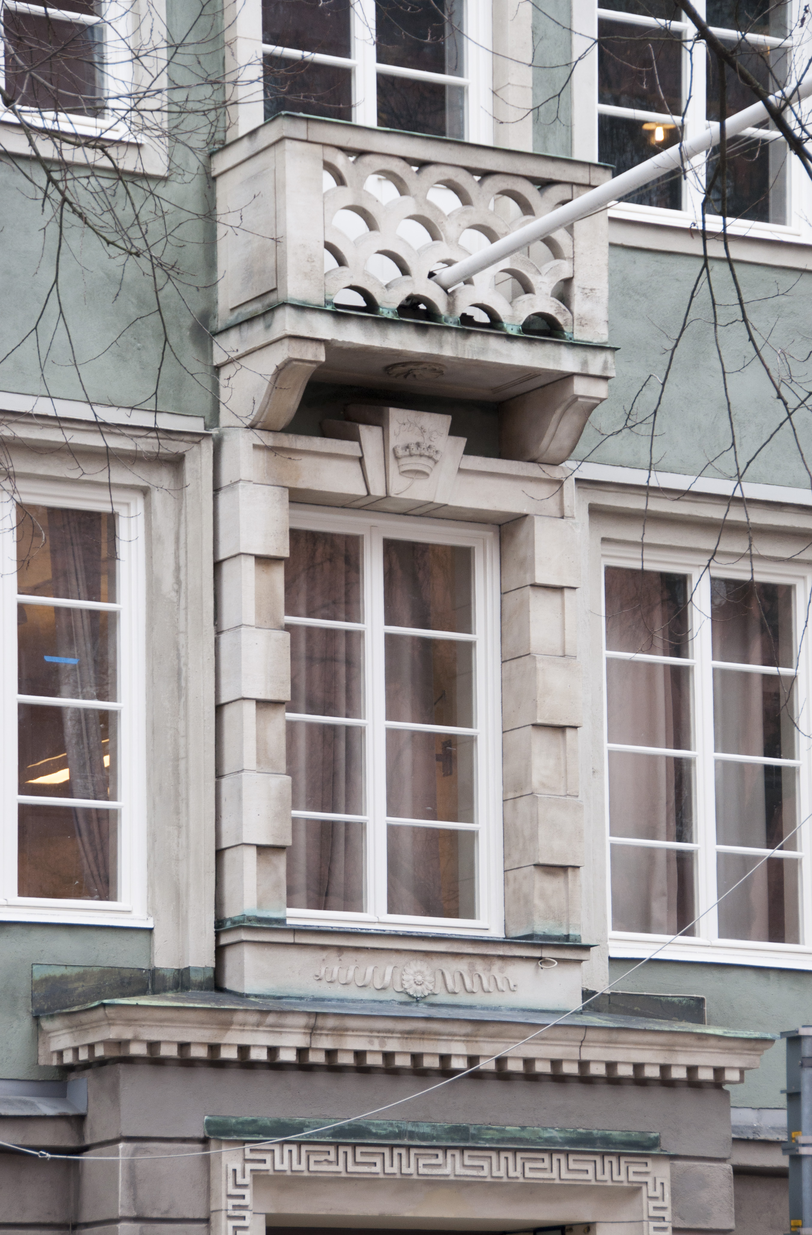 Borgarskolan, Kungstensgatan 2-8, Karlavägen 8-10, Birger Jarlsgatan 70-76. Byggnadsår 1930-32, arkitekt Knut Nordenskjöld, byggherre Stiftelsen Stockholms Borgarskola, byggmästare O Engkvist